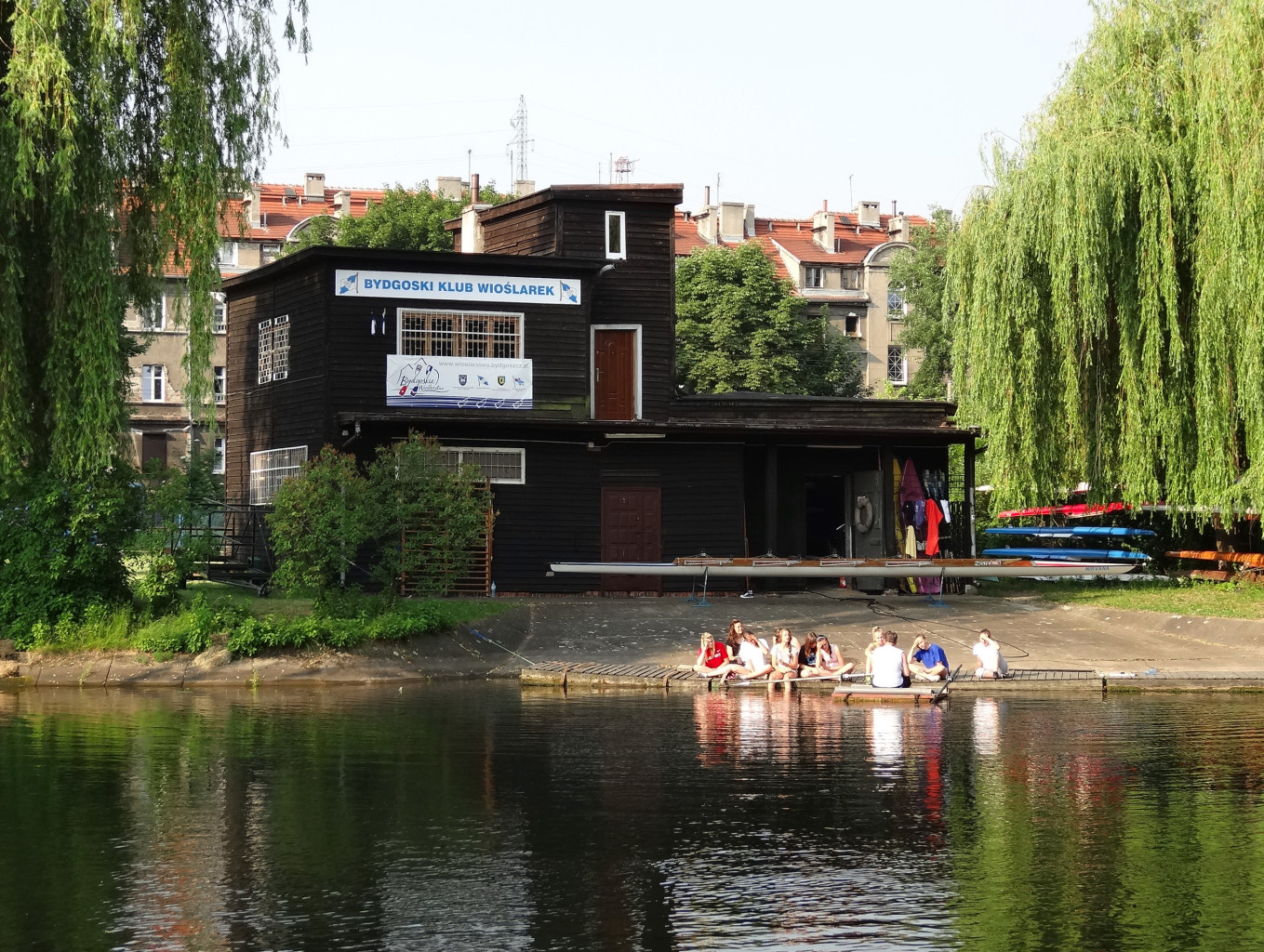 Bydgoski Klub Wioślarek z przystanią